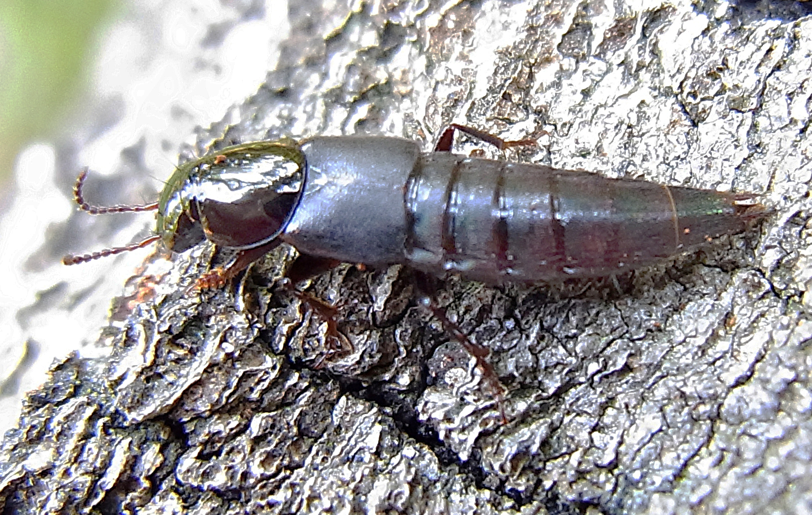 Quedius lateralis auf Baumschwamm an Eiche nahe Hornissennest, Ungarn, Donauknie gegenüber Visegrad.